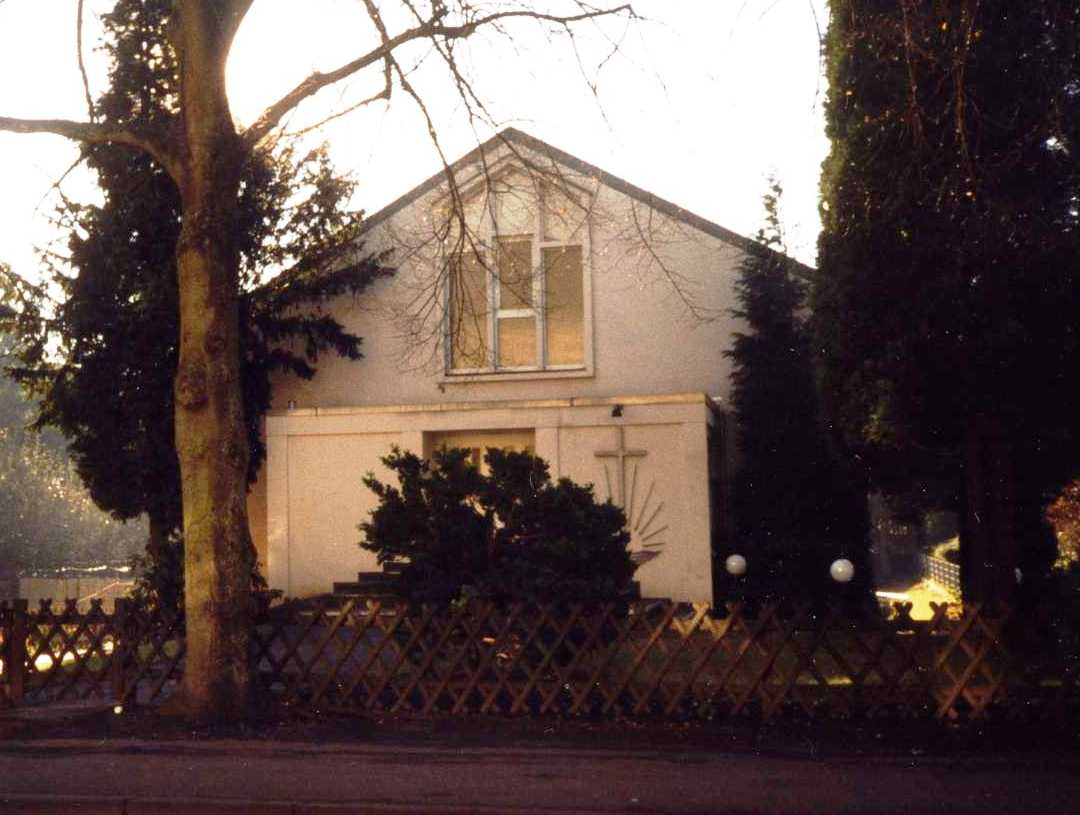 Neuapostolische Kirche in der "Kaiserstraße" in Eschweiler-Mitte